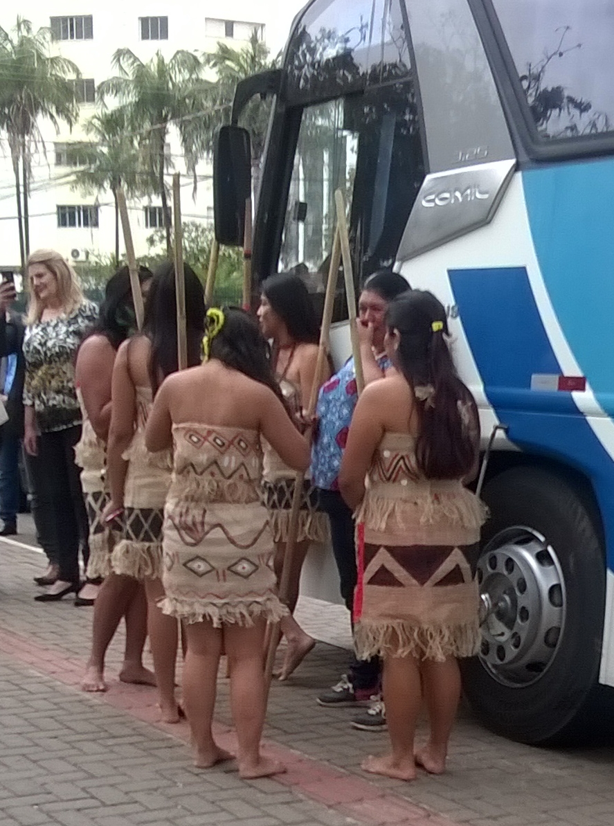 Índias caingangues da aldeia Icatu de Braúna na inauguração da escultura em homenagem aos índios caingangues na Praça Rui Barbosa em Araçatuba em 8 de julho de 2017.